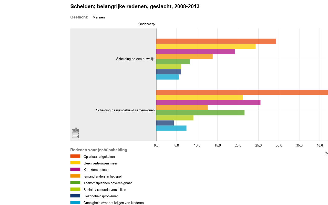 Redenen om te scheiden, 2008-2013